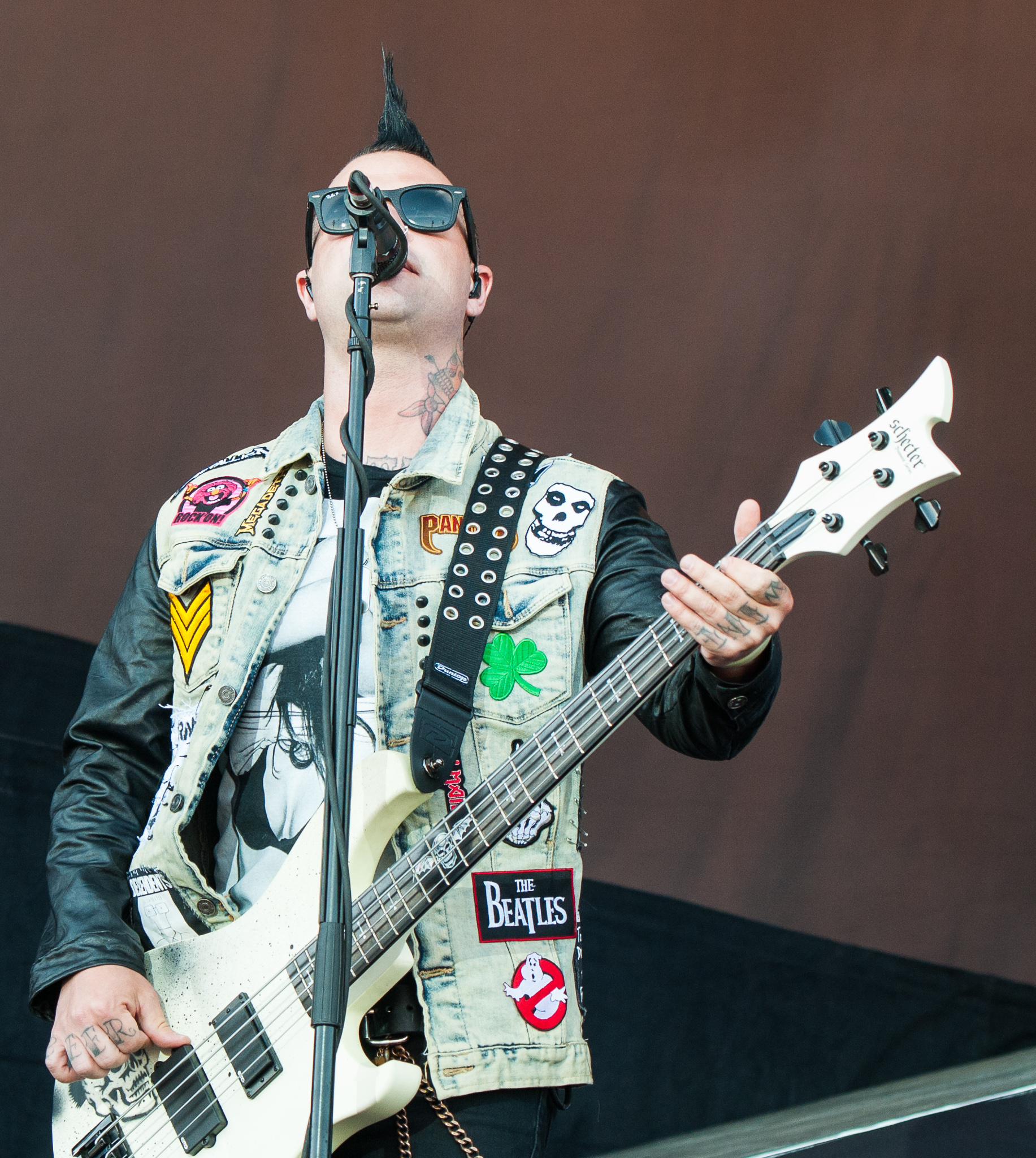 ARGO-Konzerte,Avenged Sevenfold,Johnny Christ,Jonathan Lewis Seward,Konzert,Livekonzert,Livemusik,Musik,RiP,Rock im Park 2014